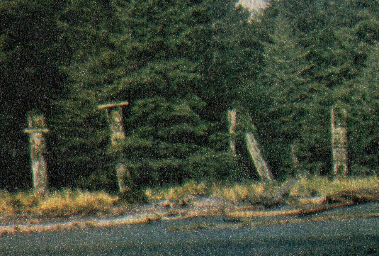 Totemy z kanadyjskiej Wyspy Antoniego. 1982r.